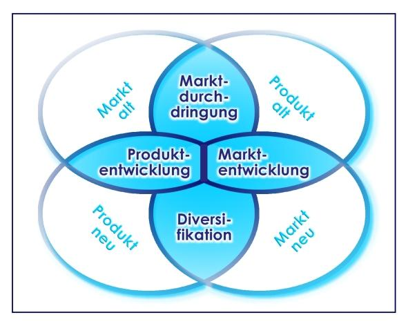 Marktfeldstrategie